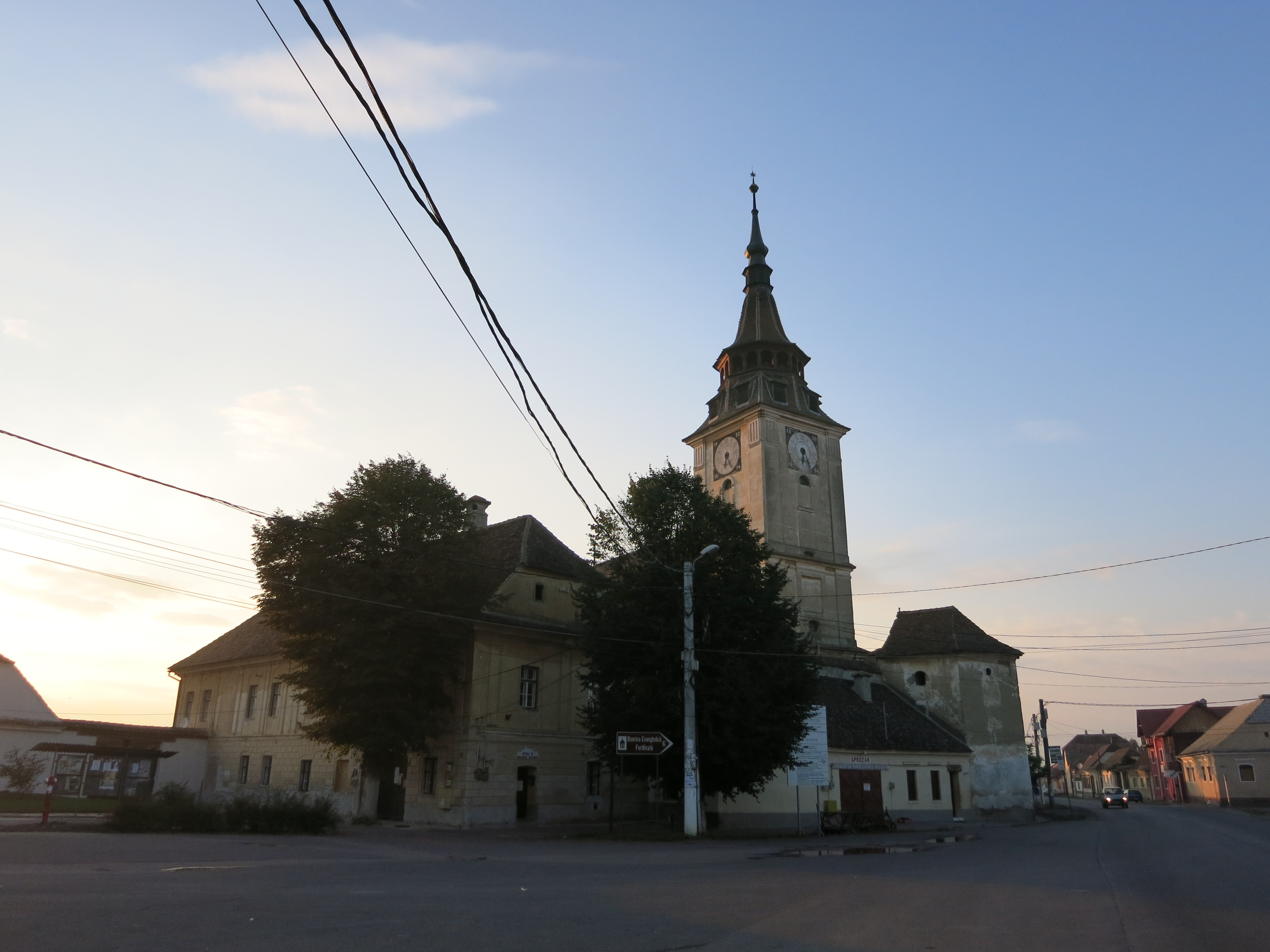 Ansamblul bisericii evanghelice fortificate , sat Sânpetru, comuna Sânpetru, Str. Republicii 641 sec. XIII-XIXBV-II-m-A-11817.01